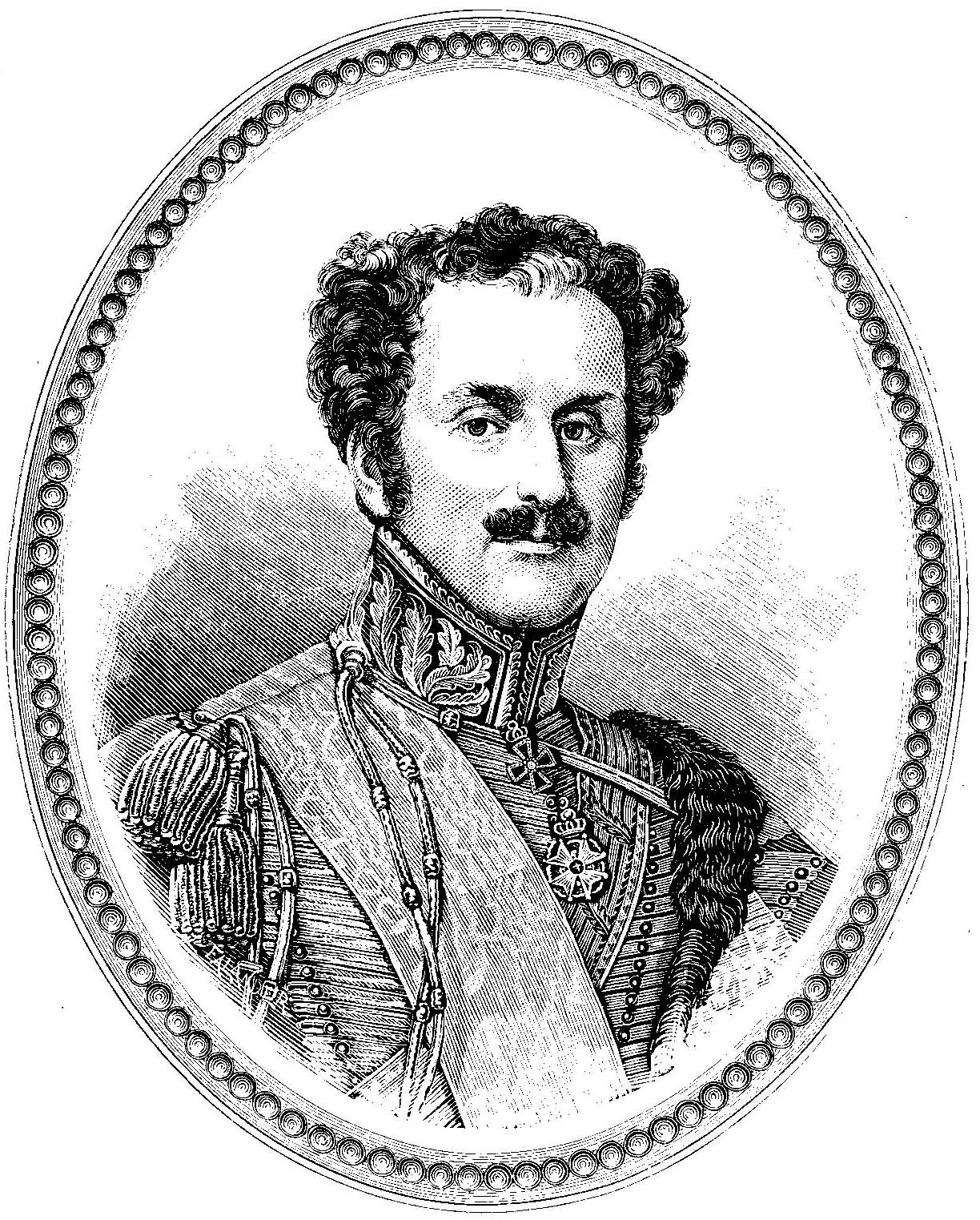 Magnus Brahe, greve och hovgunstling.